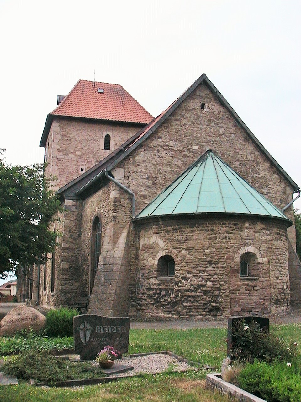 Watenstedt (Gevensleben): romanische Kirche